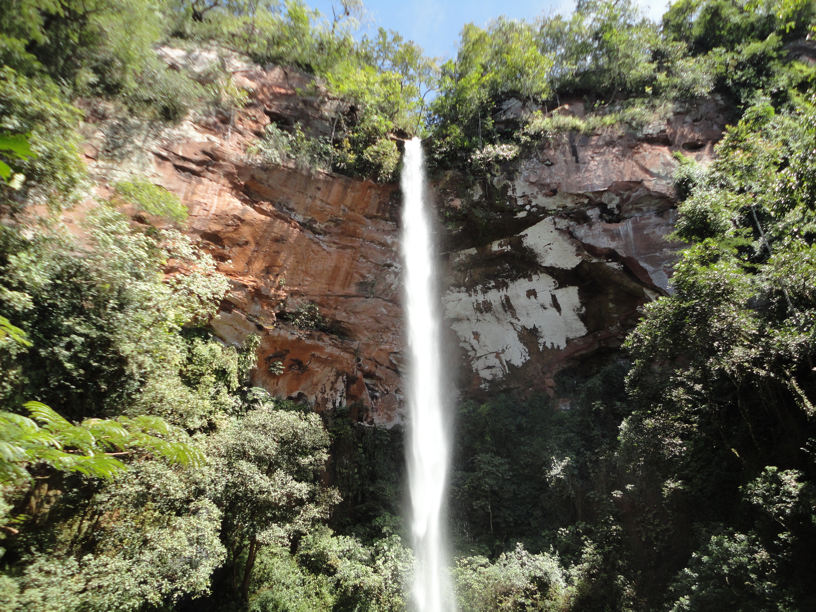 Queda d'água do Itambé em Altinópolis